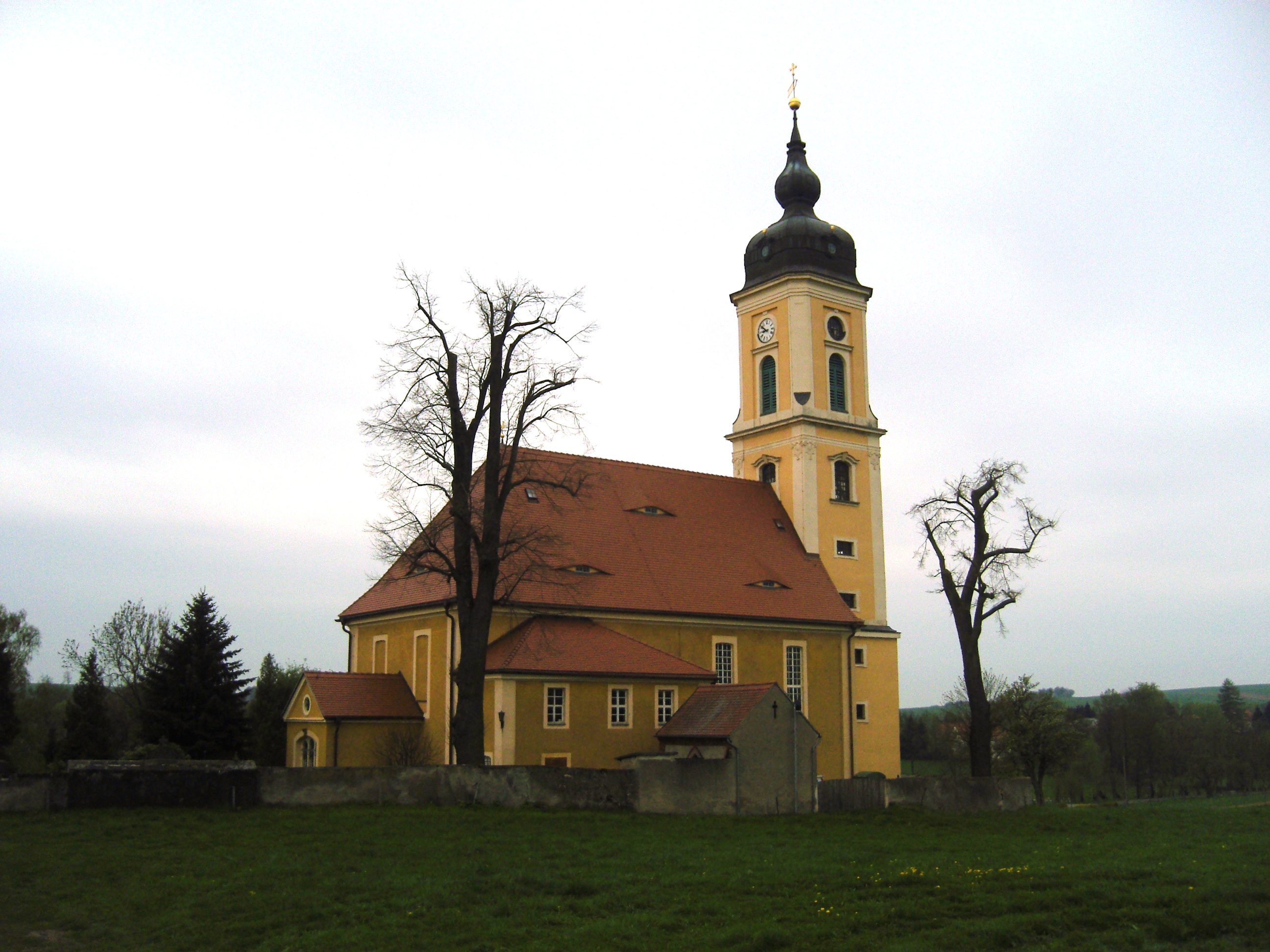 Kirche in Sora, Gemeinde Klipphausen